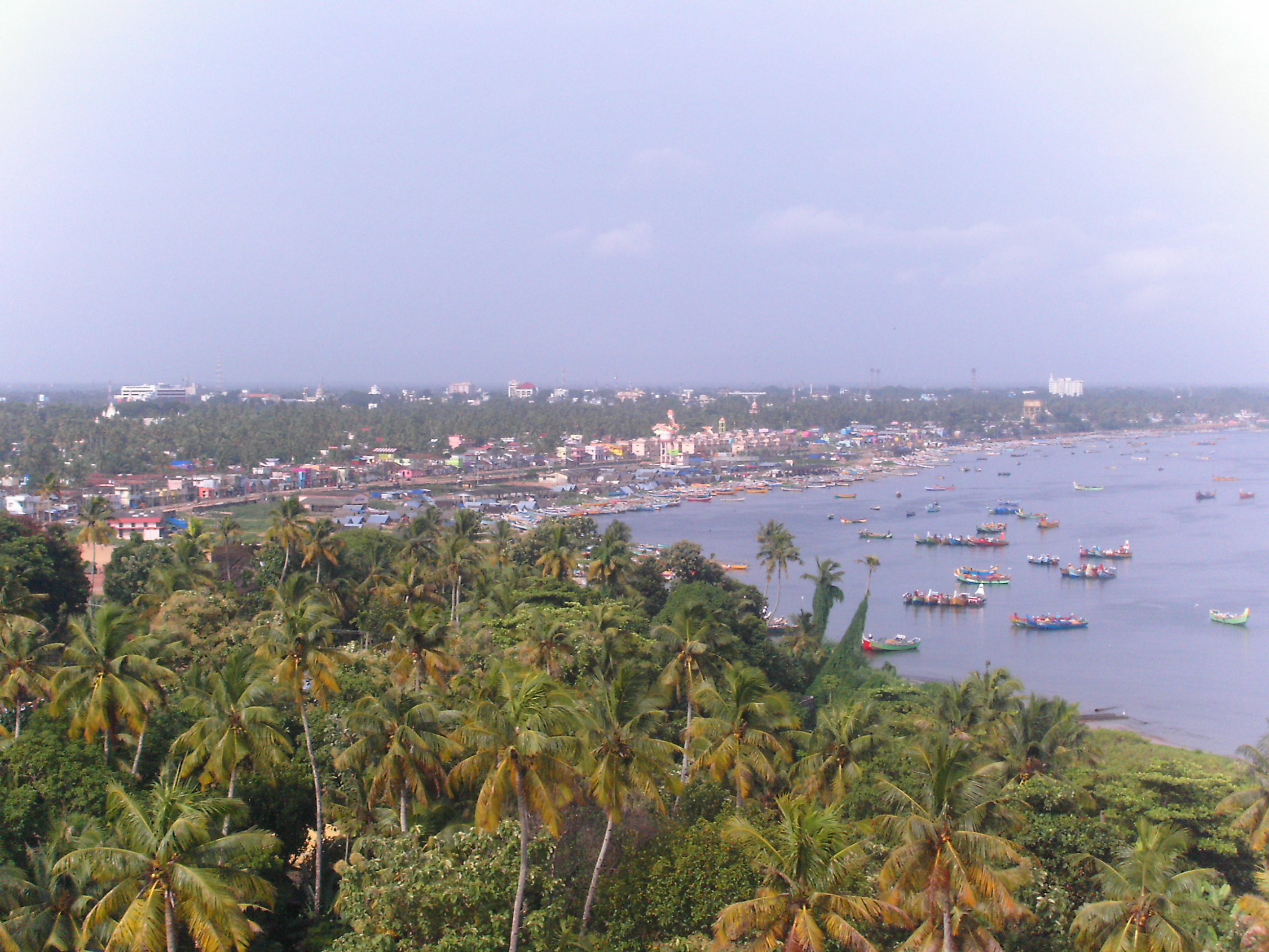 Kollam, Kerala, Indien, vom Leuchtturm aus aufgenommen.